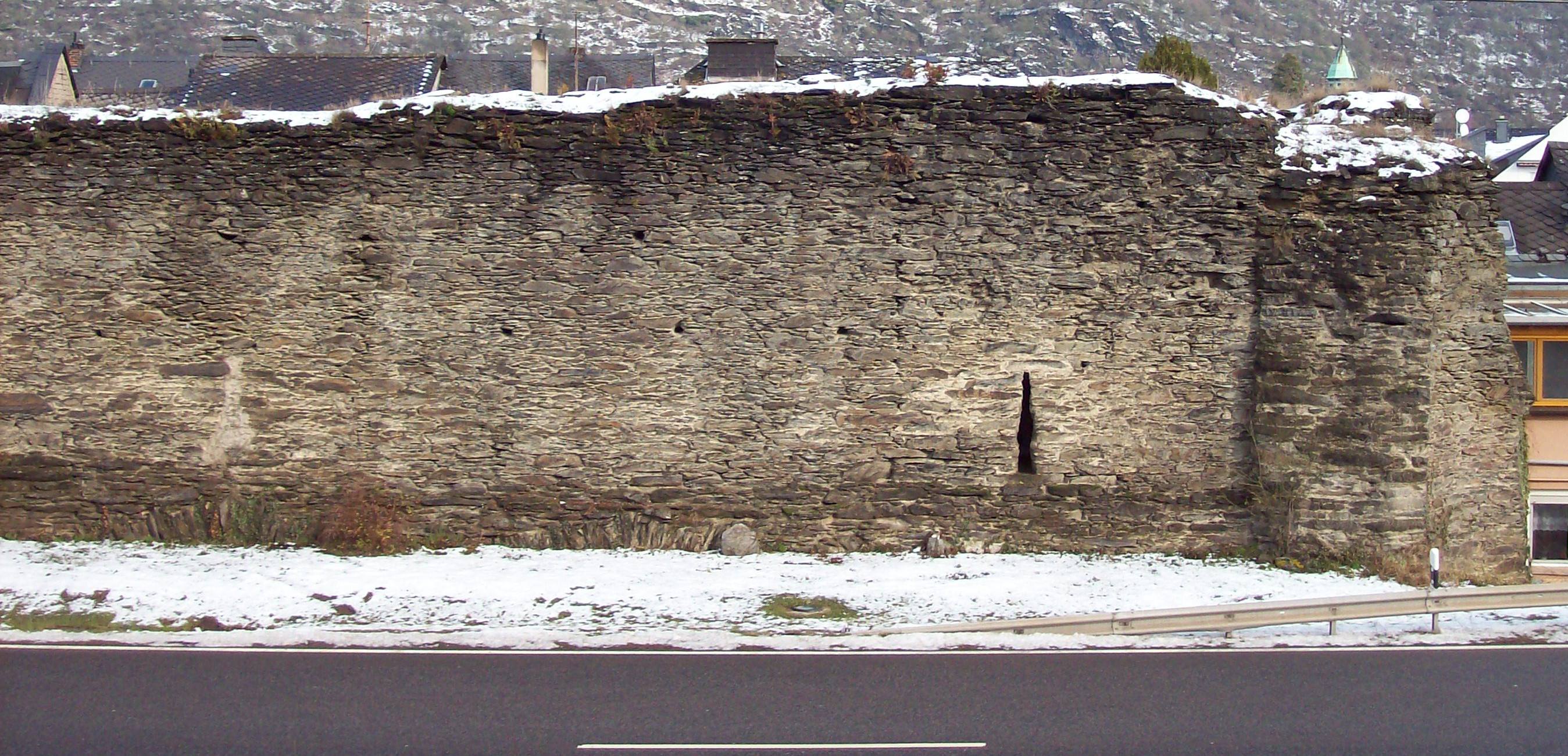 Südliches Mauerstück der mittelalterlichen Bopparder Stadtmauer um die Oberstadt